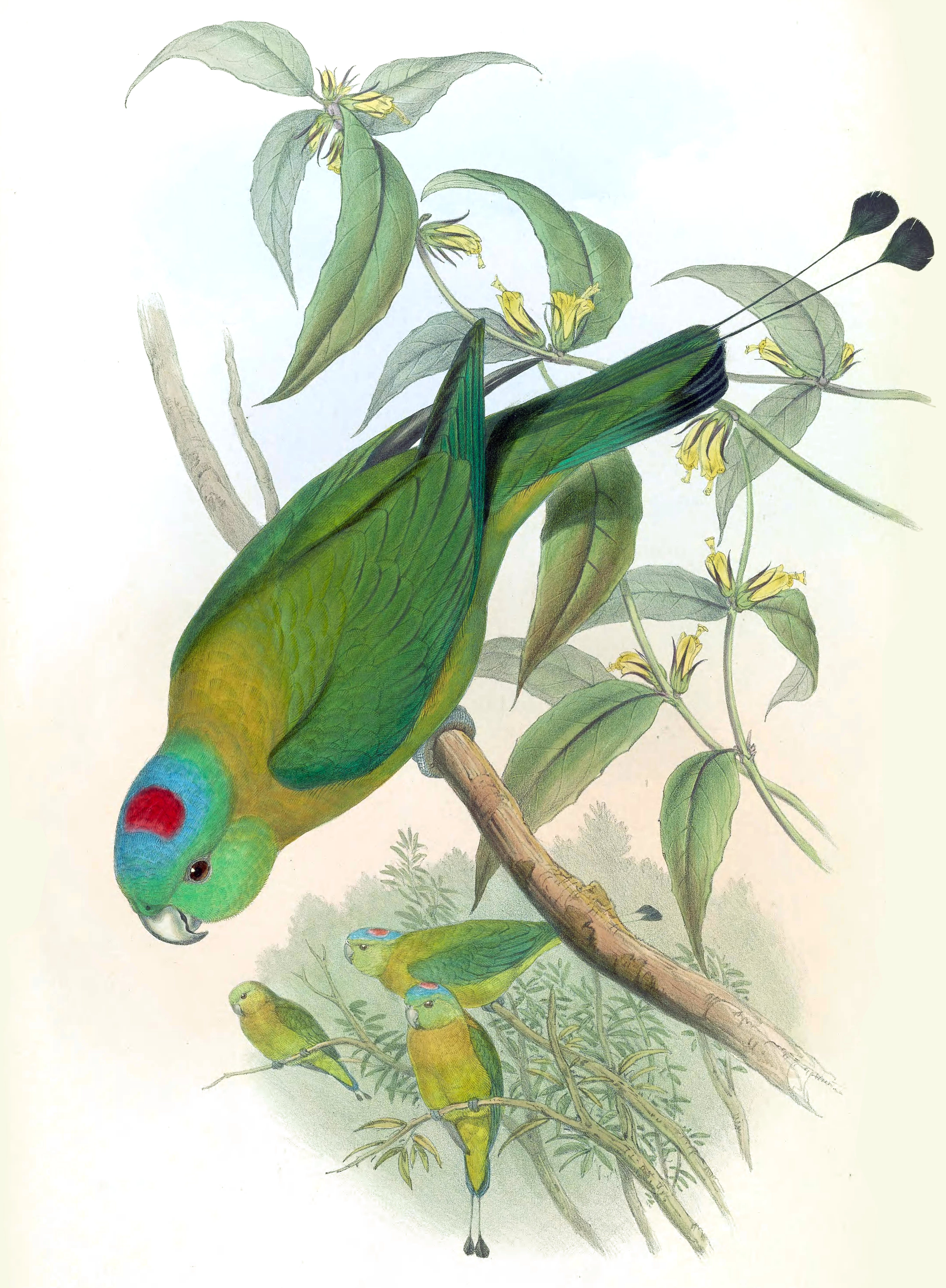 Prioniturus flavicans